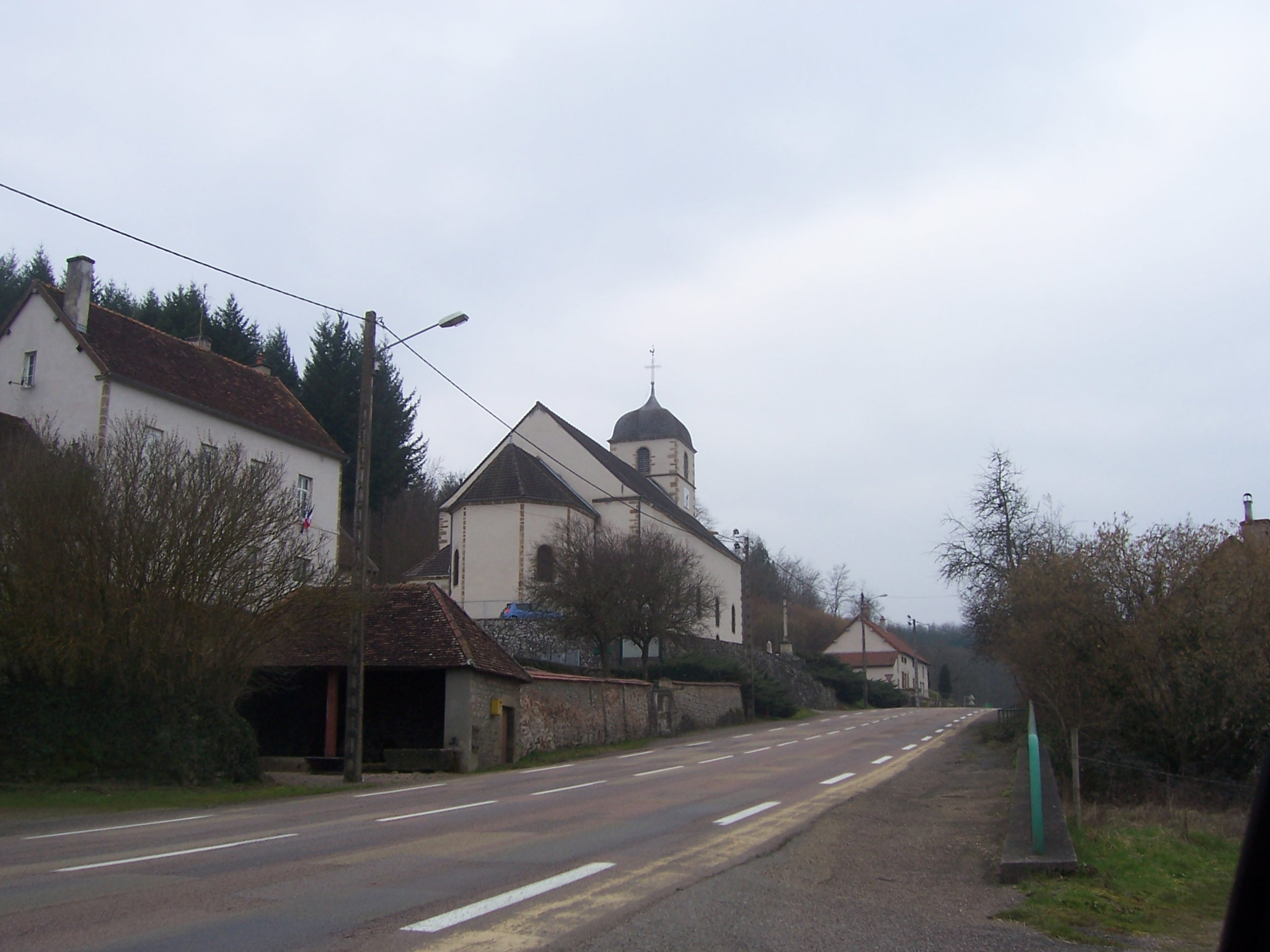 Eglise de Jouey